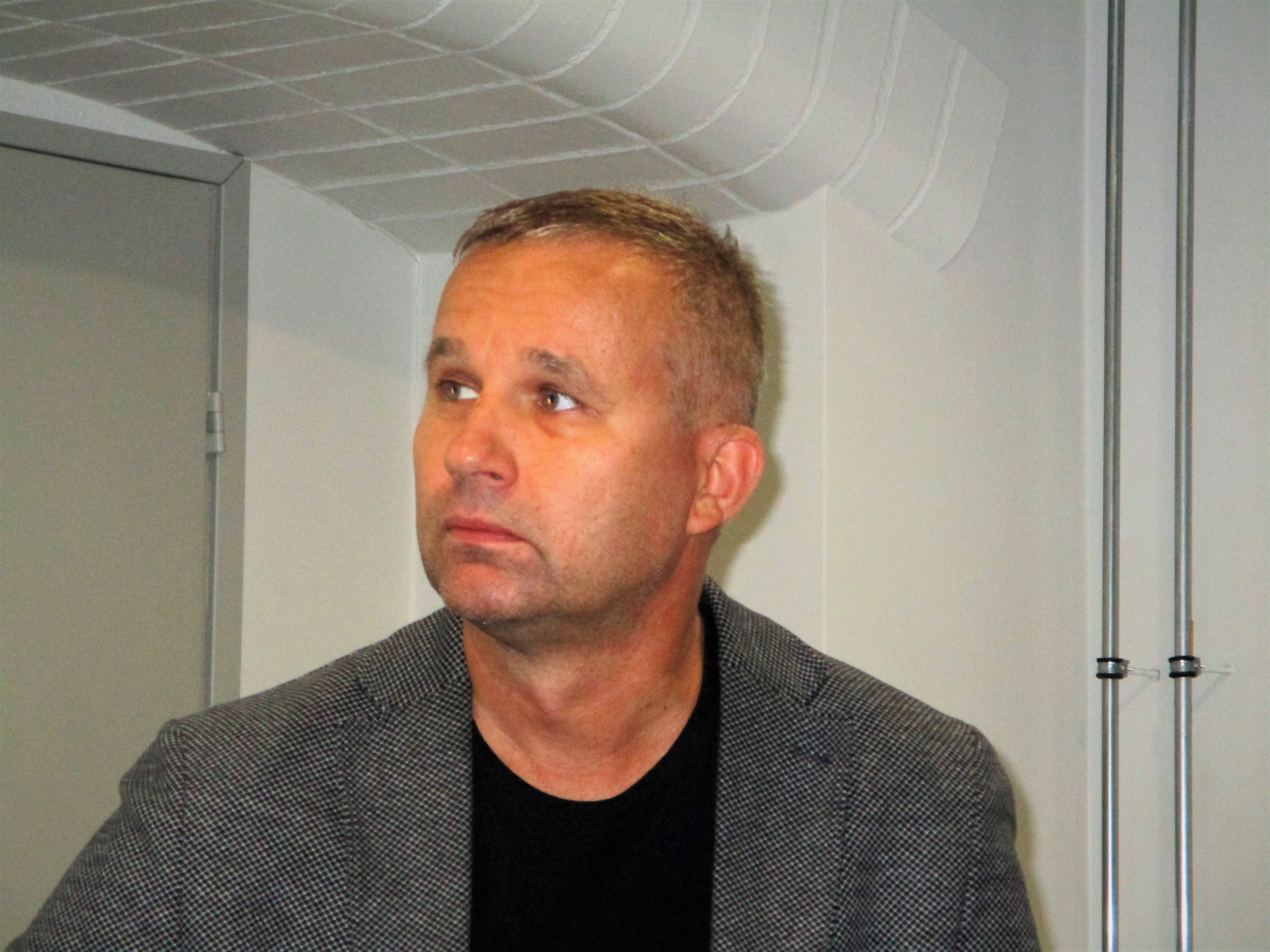 Ettevõtte Cleveron üks juhtidest Viljandis, veebruar 2018 a.